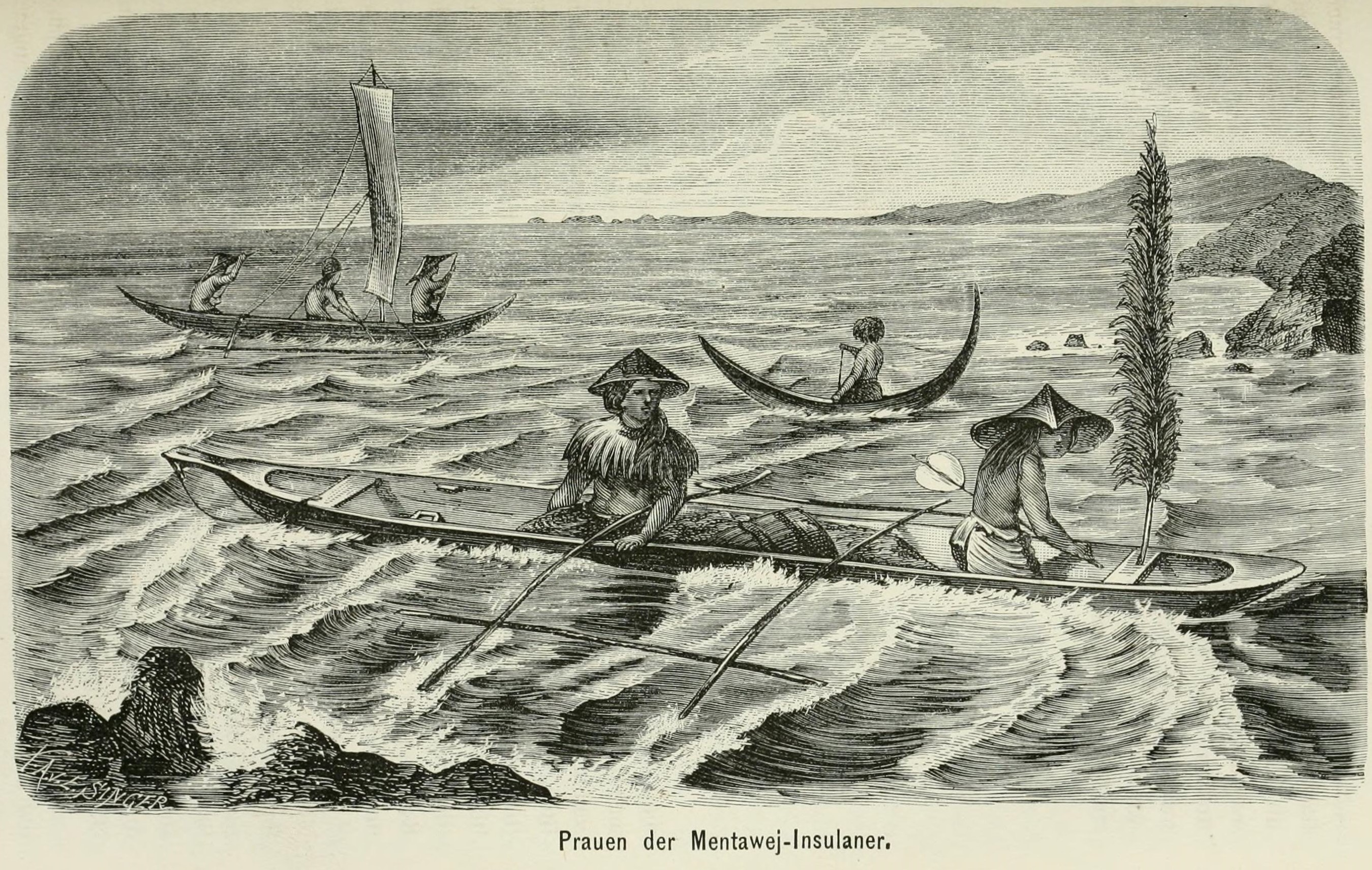 Prauen der Mentawej-Insulaner